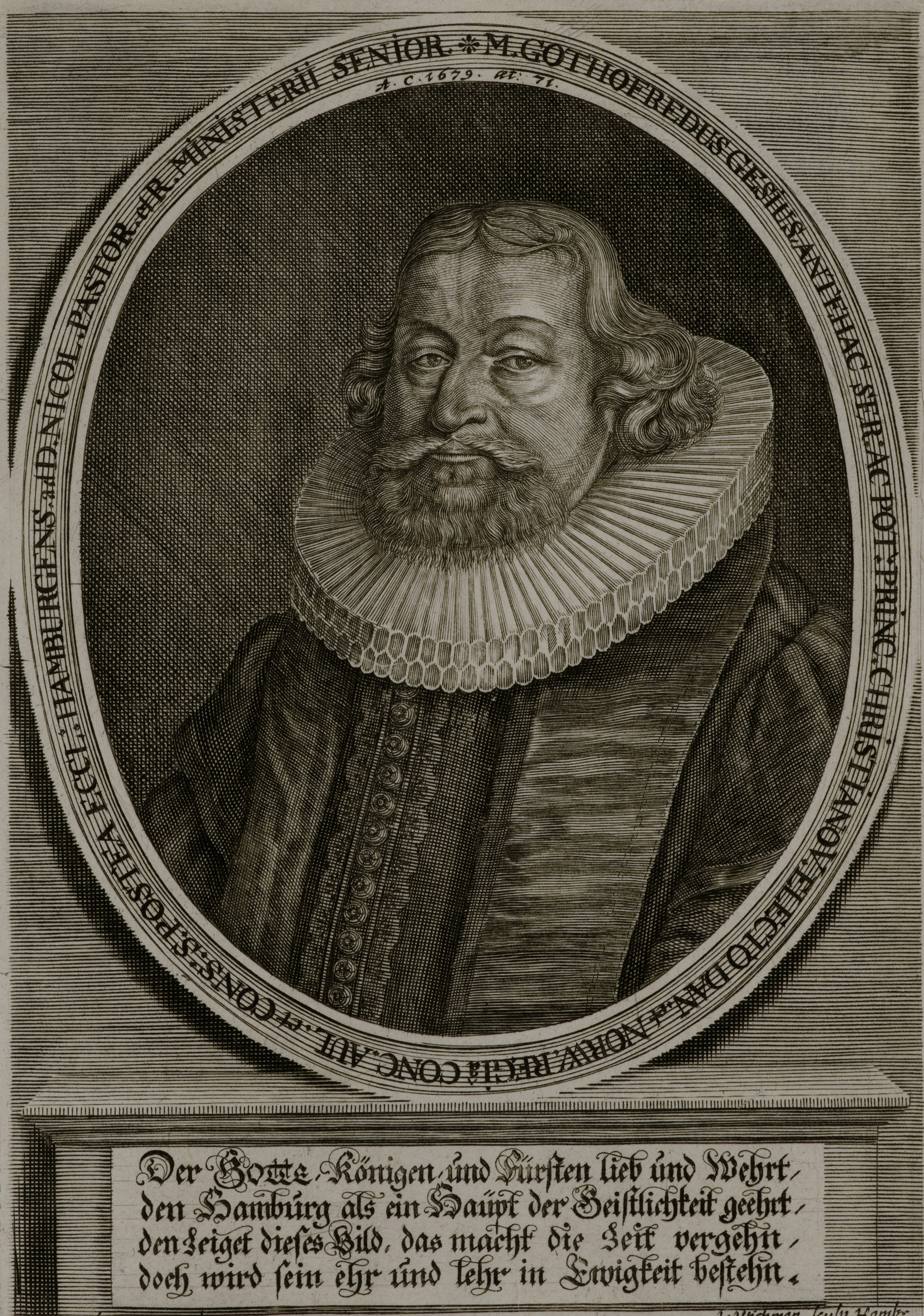 Bildnis von Gotfried Gesius